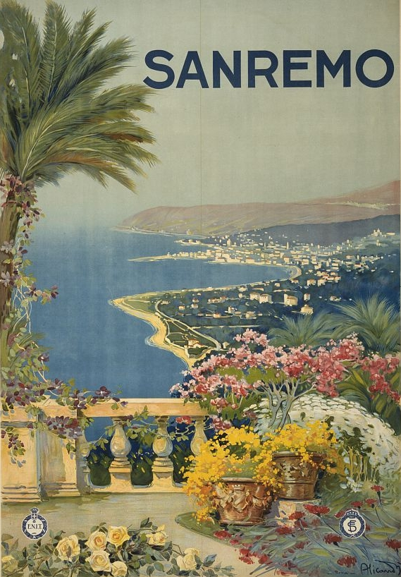 Sanremo poster ca. 1920